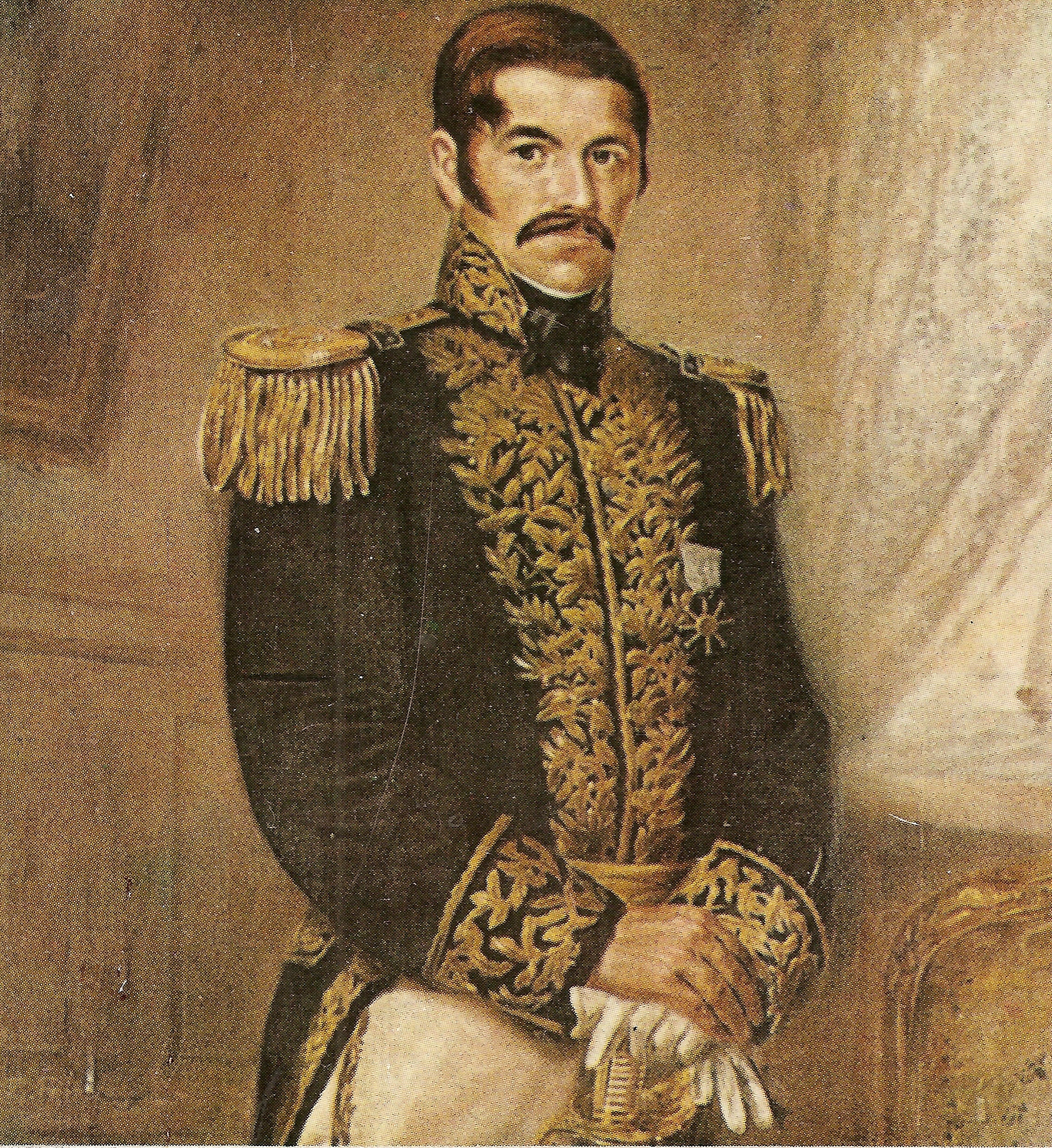 Luis Brión, Almirante venezolano,retrato realizado por Antonio Esteban Frías en 1913 y reposa en el salon eliptico del Palacio Federal en Caracas - Venezuela